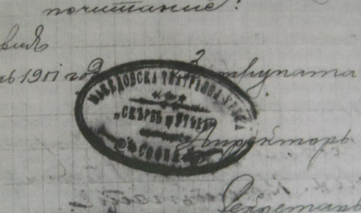 Печат на Македонската театрална група "Скръб и утеха"